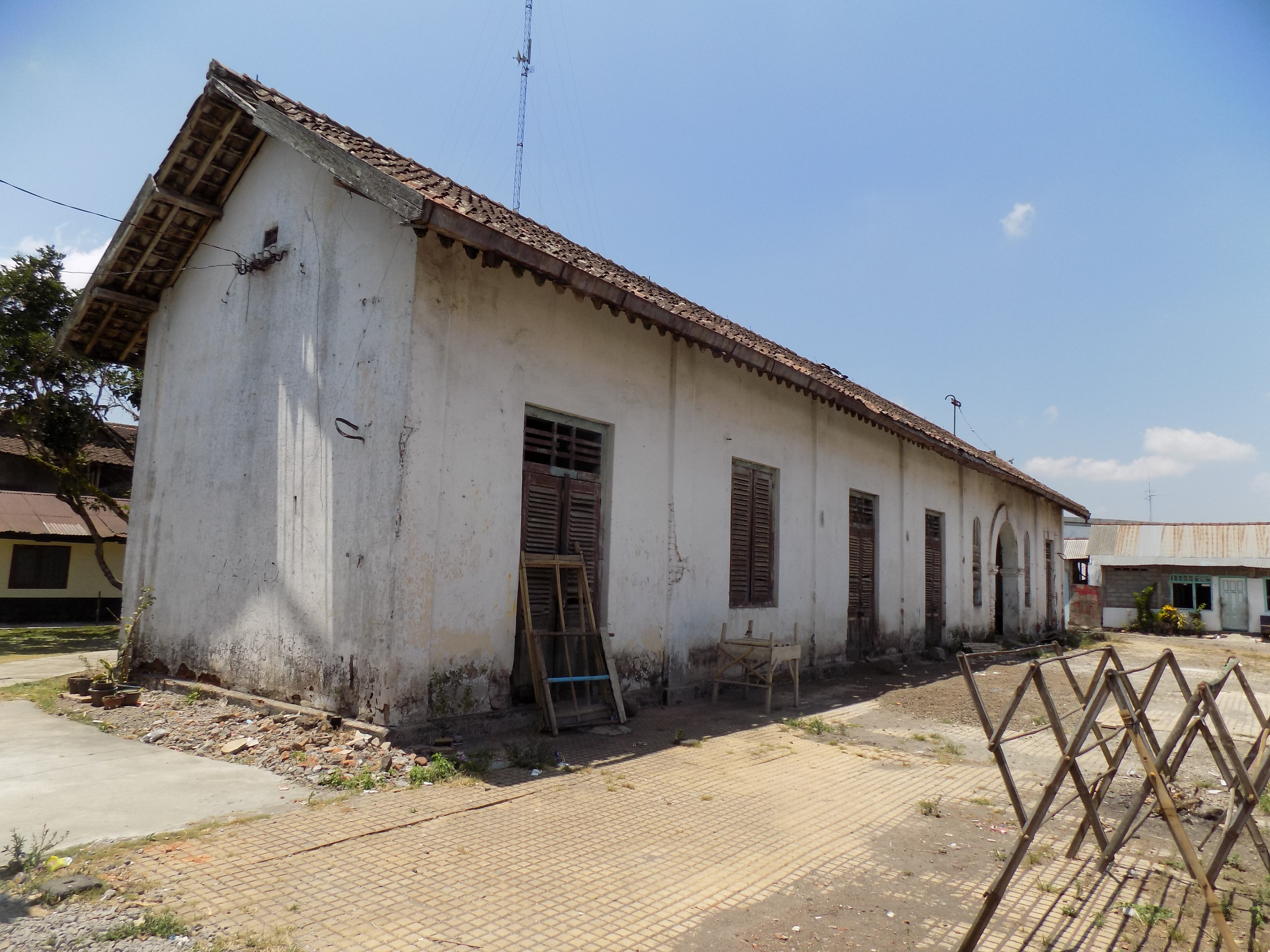 Stasiun Secang yang menjadi tempat perkumpulan warga